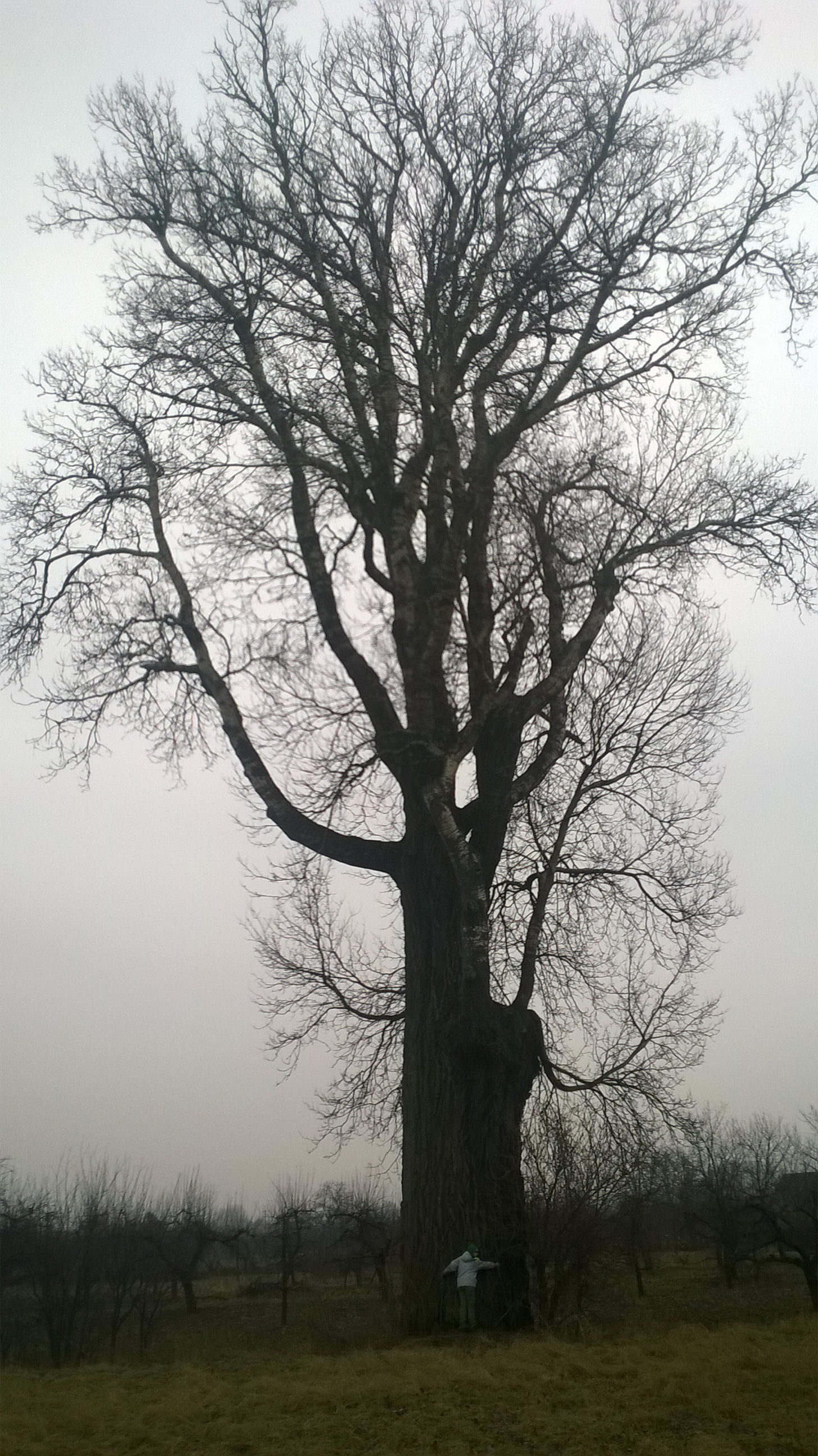 30 m wysokości 680 cm obwodu(na 1,30 cm)